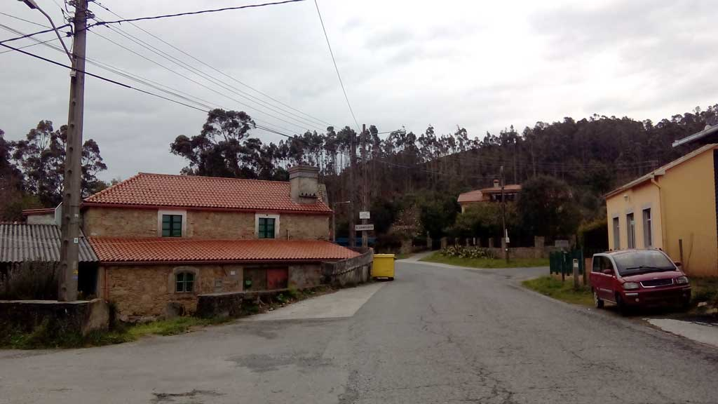 Vista do Confurco, Mandiá, Ferrol.